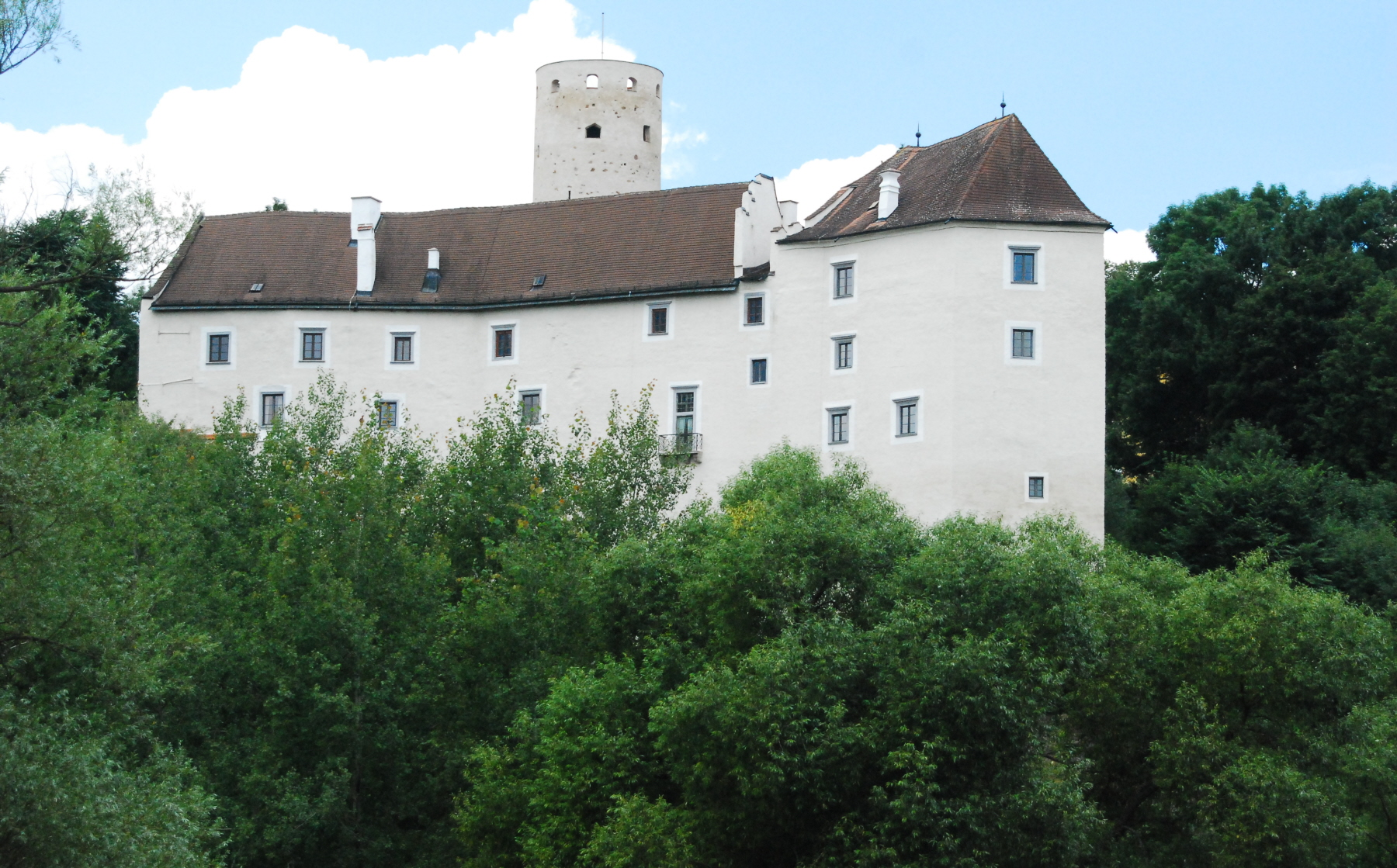 Schloss Karlstein in Karlstein an der Thaya in Niederösterreich